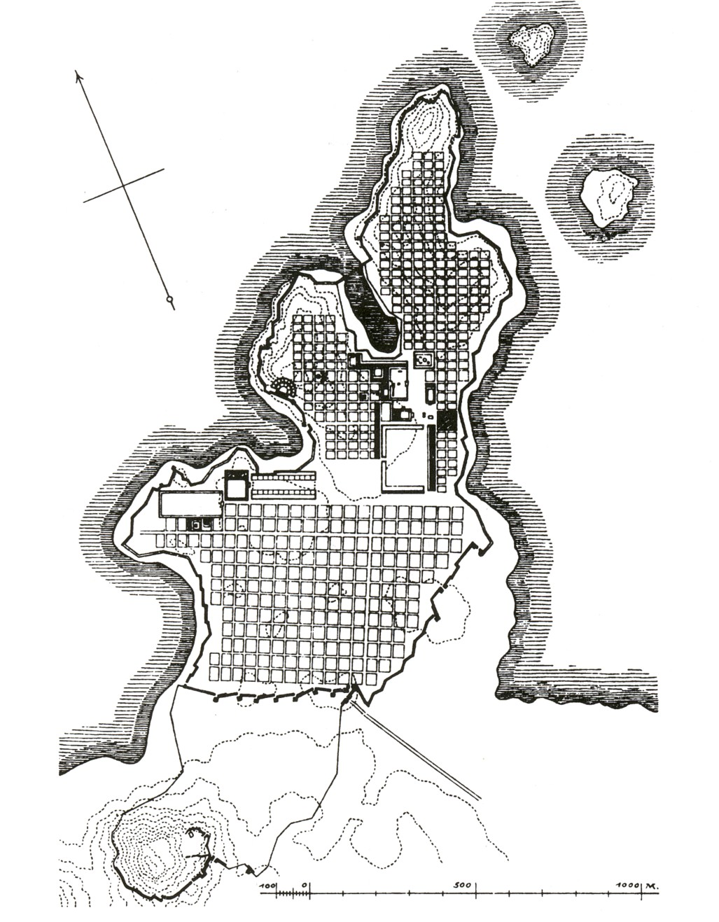 Stadsplanen för den antika staden Miletos, Grekland